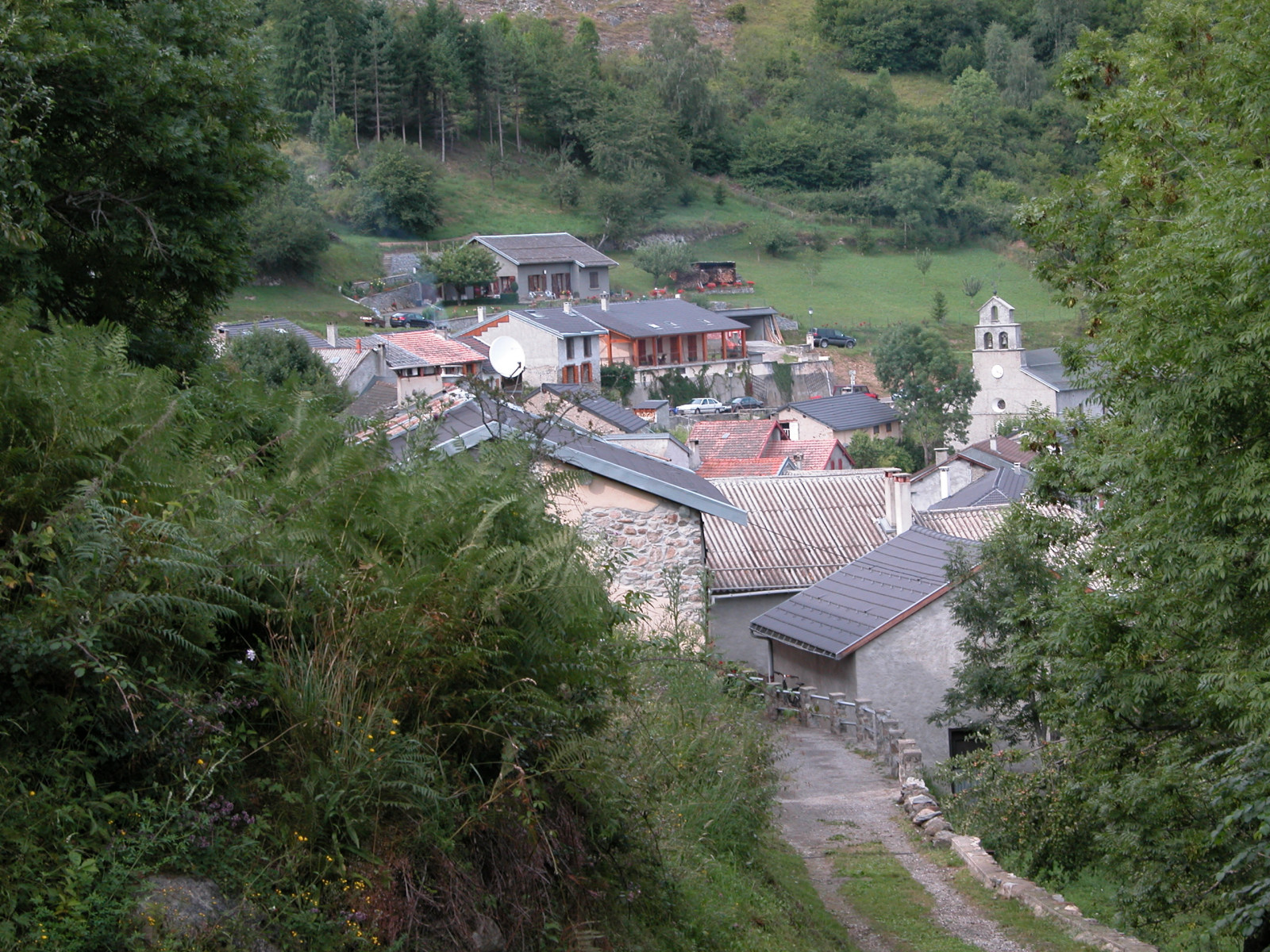 Vue génerale du village de Lercoul(Ariège 09)